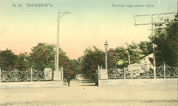 Ворота городского сада, Таганрог Ростовская область РФ